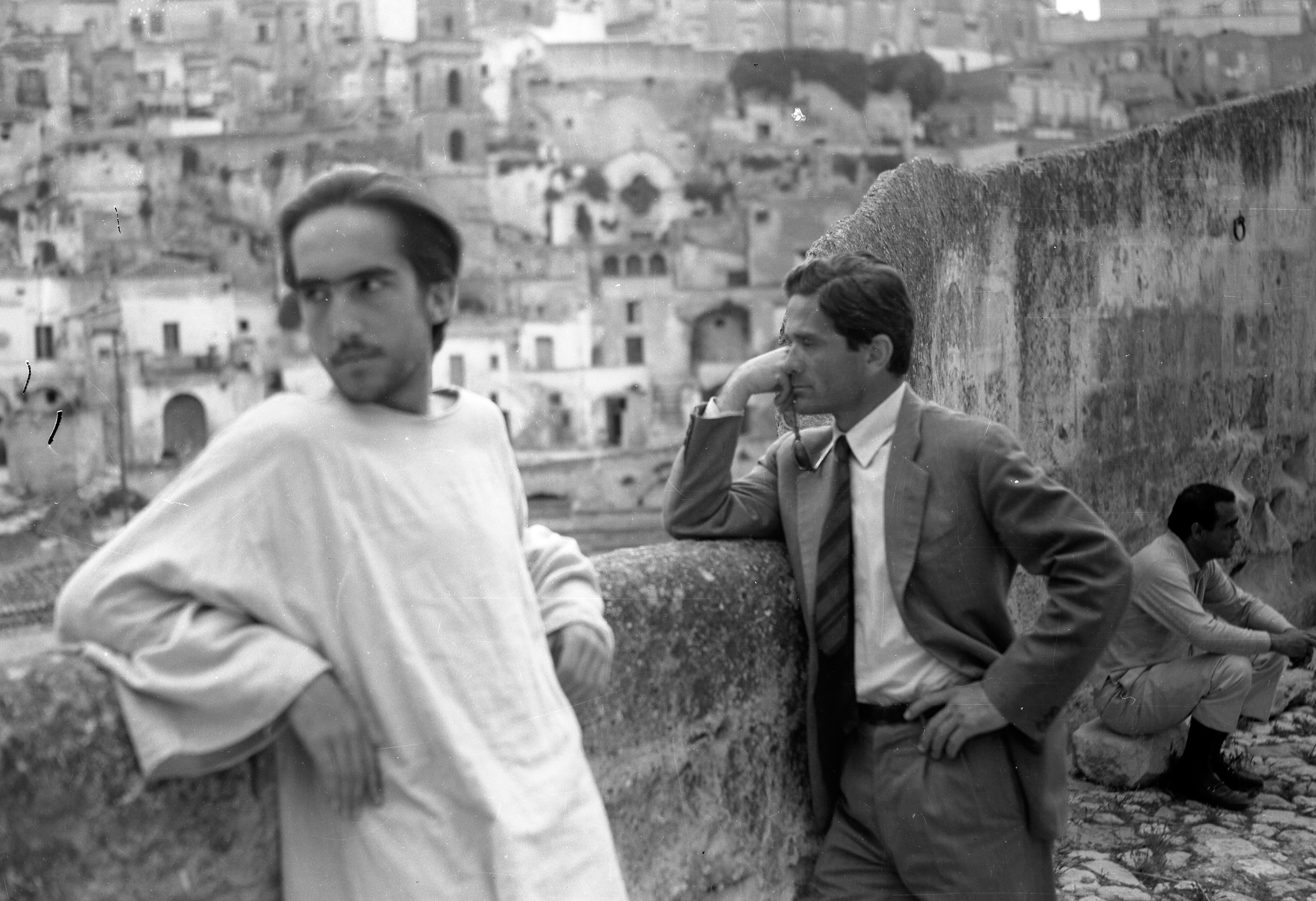 Pier Paolo Pasolini e Enrique Irazoqui, in un momento di pausa, dinanzi allo struggente paesaggio dei Sassi. Sullo sfondo a destra seduto, Maurizio Lucidi, aiuto regista